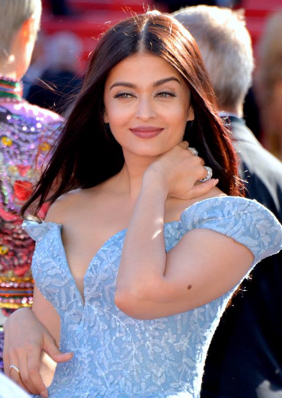 Aishwarya Rai au festival de Cannes